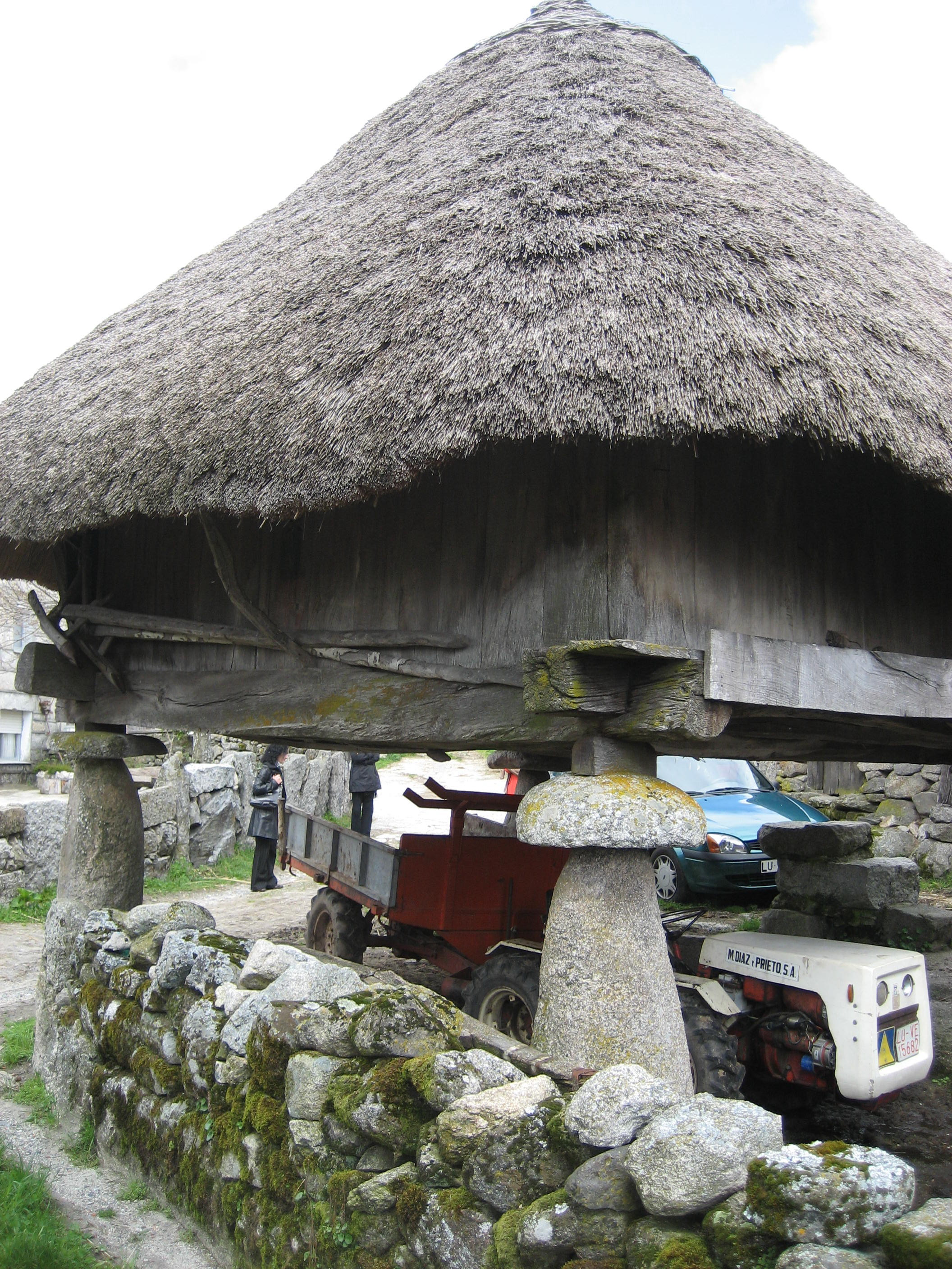 Piornedo Os Ancares Lugo